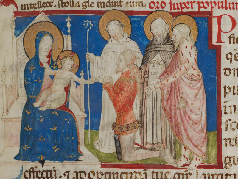 bernabo visconti priant